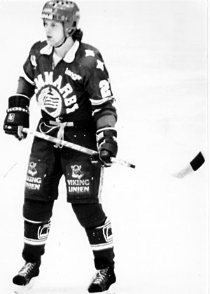 Orvar Stambert i Hammarby